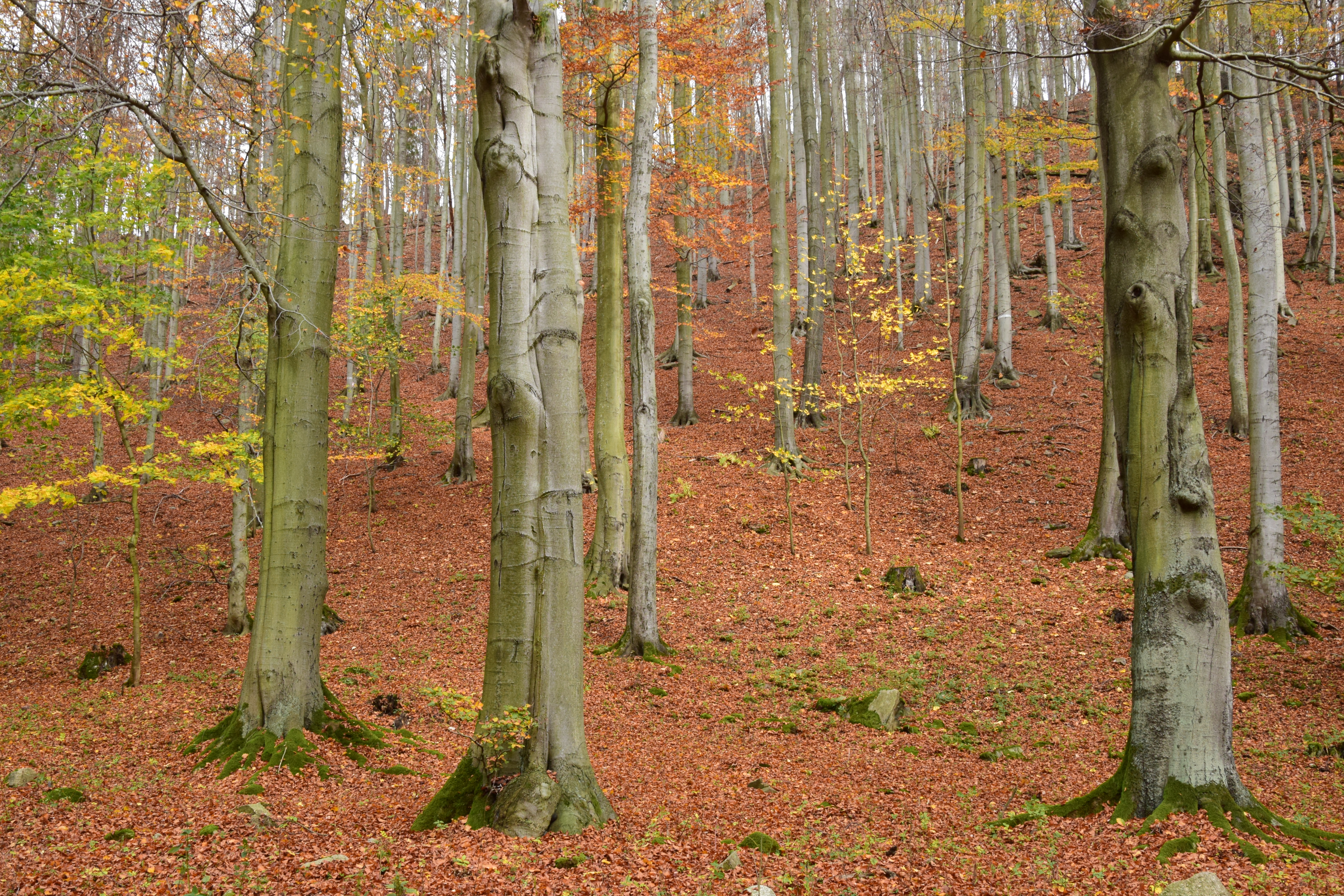 Přírodní památka Drmaly – bučina